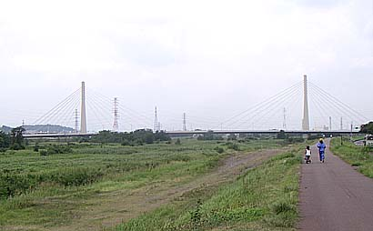 多摩川にかかる東京都道20号・神奈川県道525号府中相模原線の府中四谷橋。東京都府中市側から撮影。対岸は、日野市。